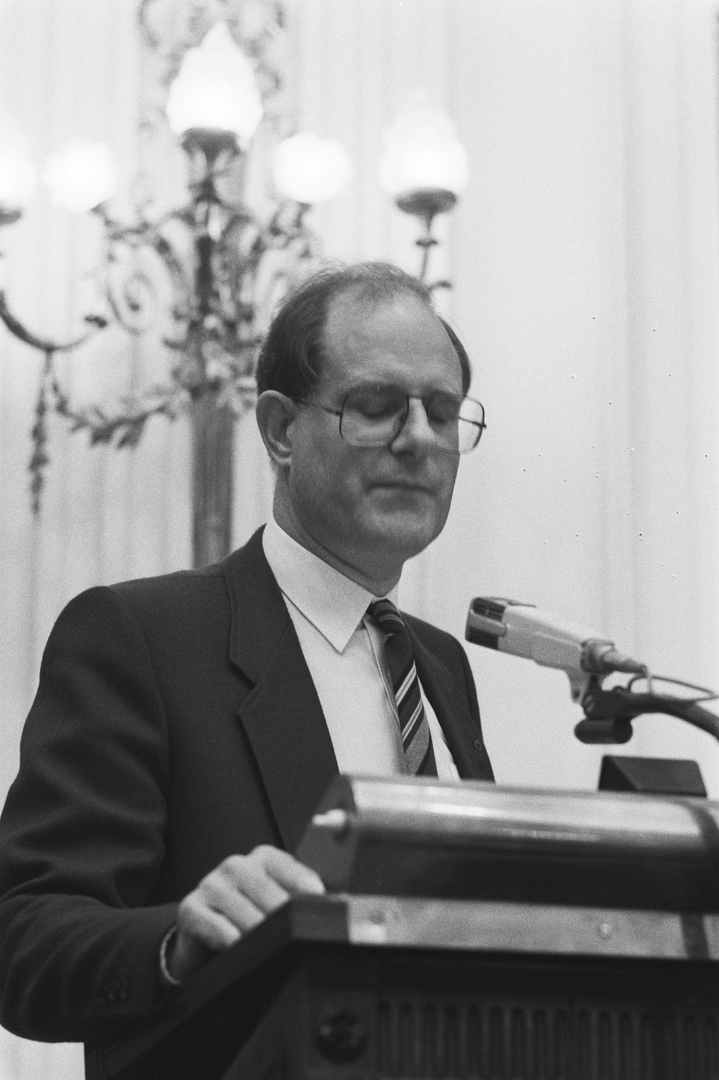 Collectie / Archief : Fotocollectie Anefo Reportage / Serie : Tweede Kamer debat; Interpellatie van minister Rood over politiesterkte; Beschrijving : Kamerlid Piet Stoffelen (PvdA) Datum : 26 augustus 1982 Locatie : Den Haag, Zuid-Holland Trefwoorden : parlementaire debatten, politiek, portretten Persoonsnaam : Stoffelen, Piet Instellingsnaam : PvdA, Tweede Kamer Fotograaf : Croes, Rob C. / Anefo Auteursrechthebbende : Nationaal Archief Materiaalsoort : Negatief (zwart/wit) Nummer archiefinventaris : bekijk toegang 2.24.01.05 Bestanddeelnummer : 932-2950